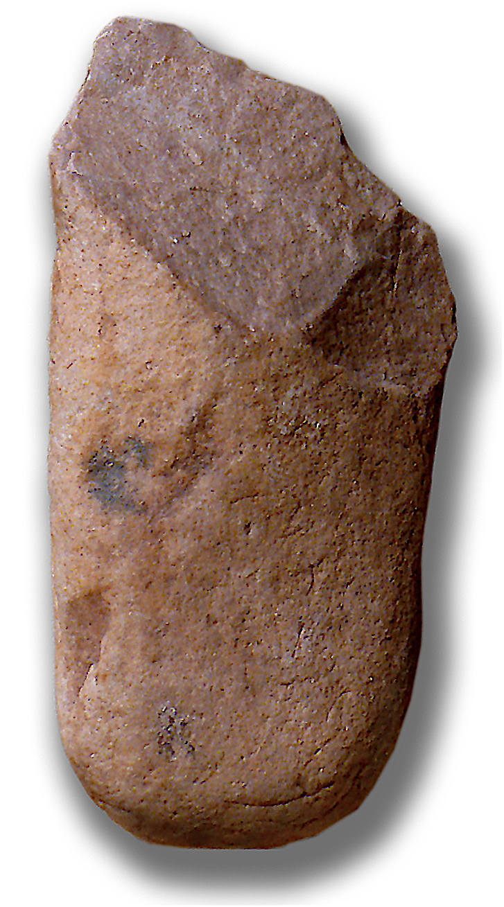 Canto tallado de tradición Olduvayense procedente de la región del Sáhara atlántico Guelmim-Es Semara (Museo Arqueológico Nacional de Madrid)